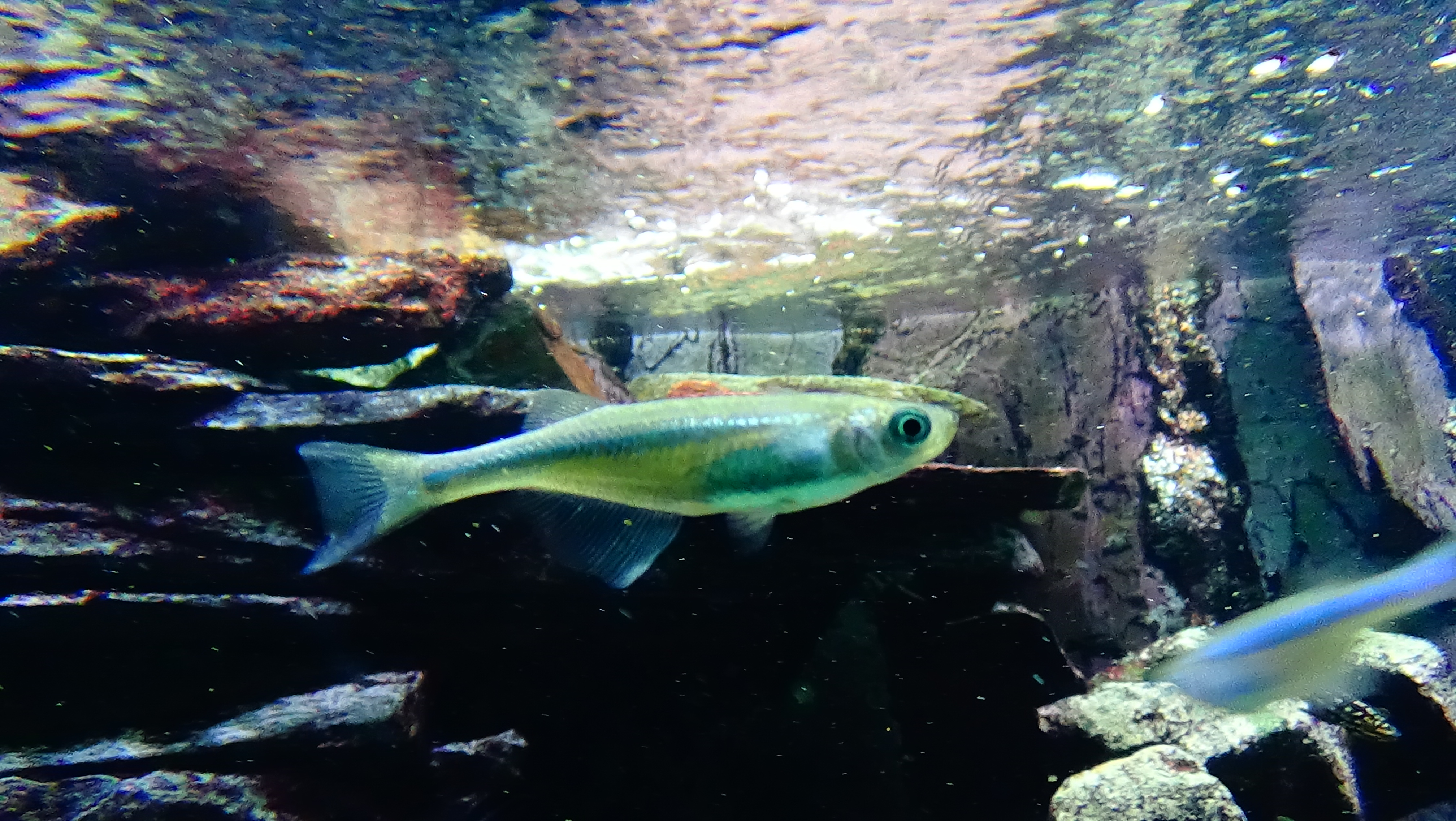 Lamprichthys tanganicanus - Femelle - Aquarium Tropical du Palais de la Porte Dorée - Paris/France